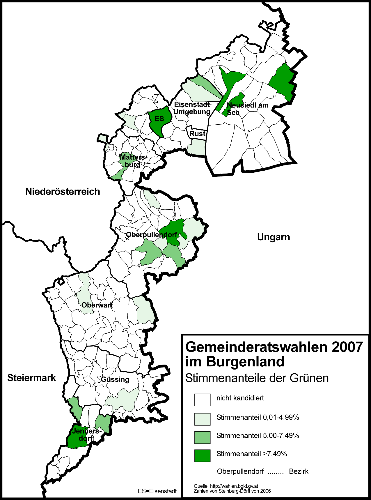 Stimmenanteile der Grünen bei den Gemeinderatswahlen 2007 im Burgenland